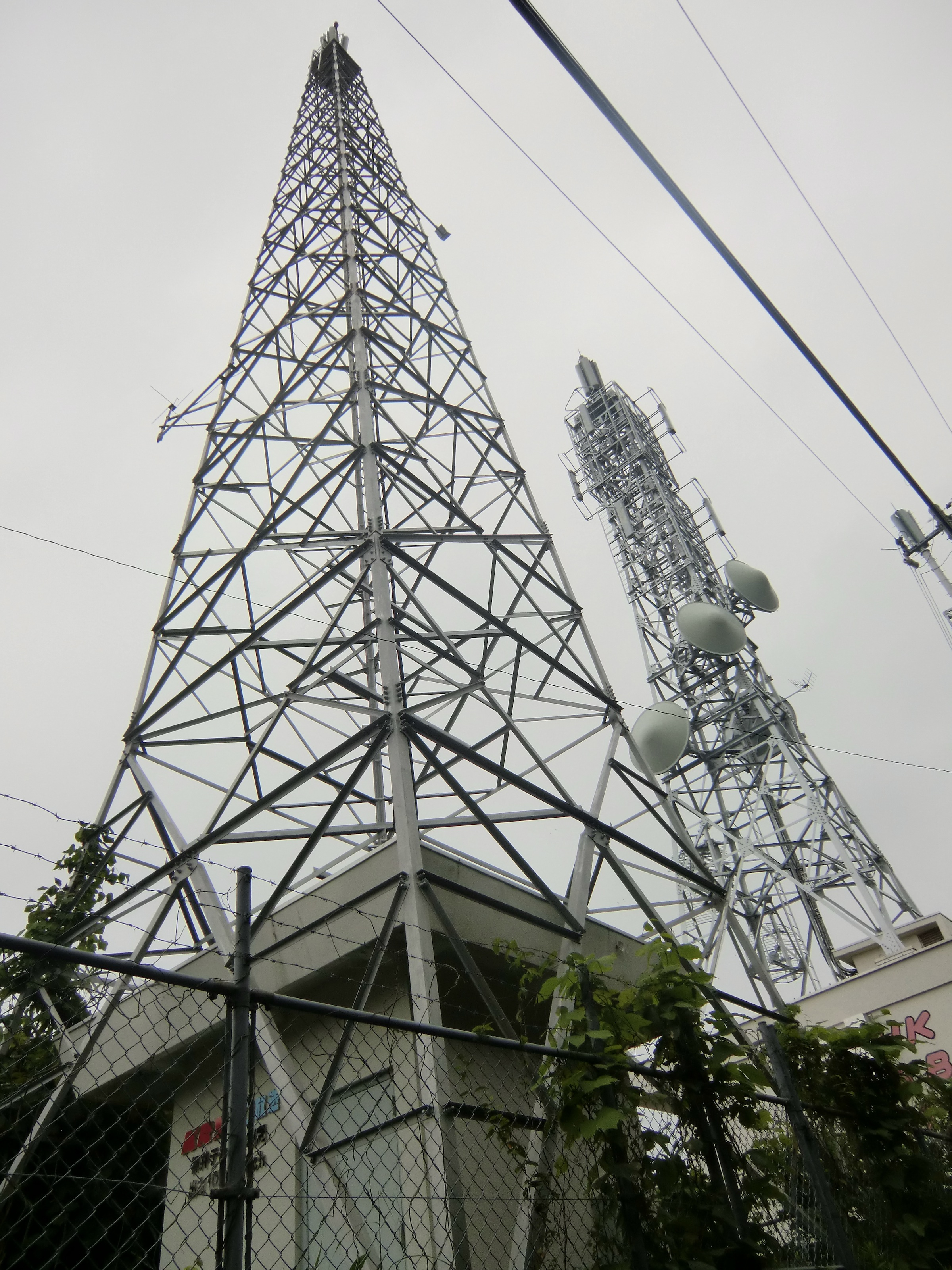 石城山神籠石（光市）の城域にある電波塔